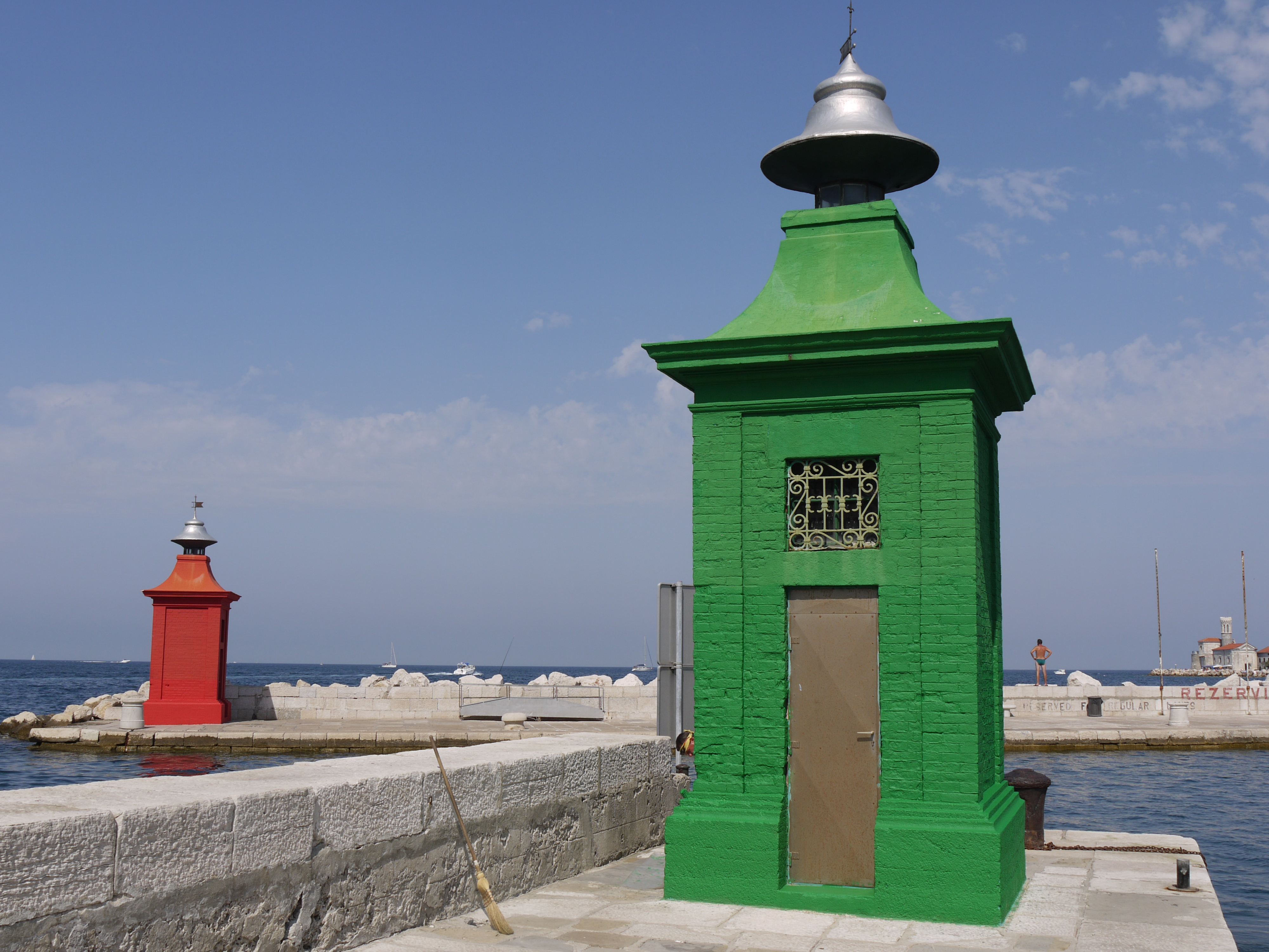 Piran Harbour, Slovenia